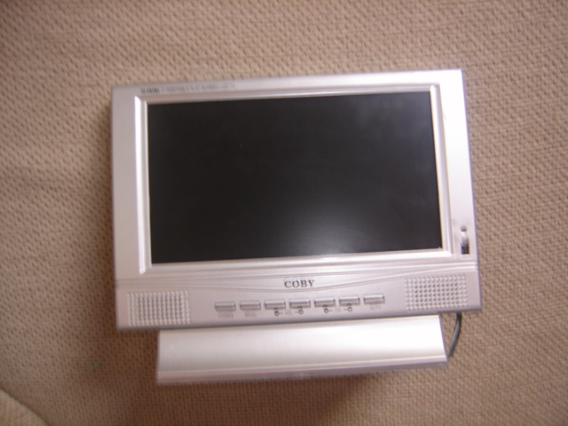 tela LCD portatíl.